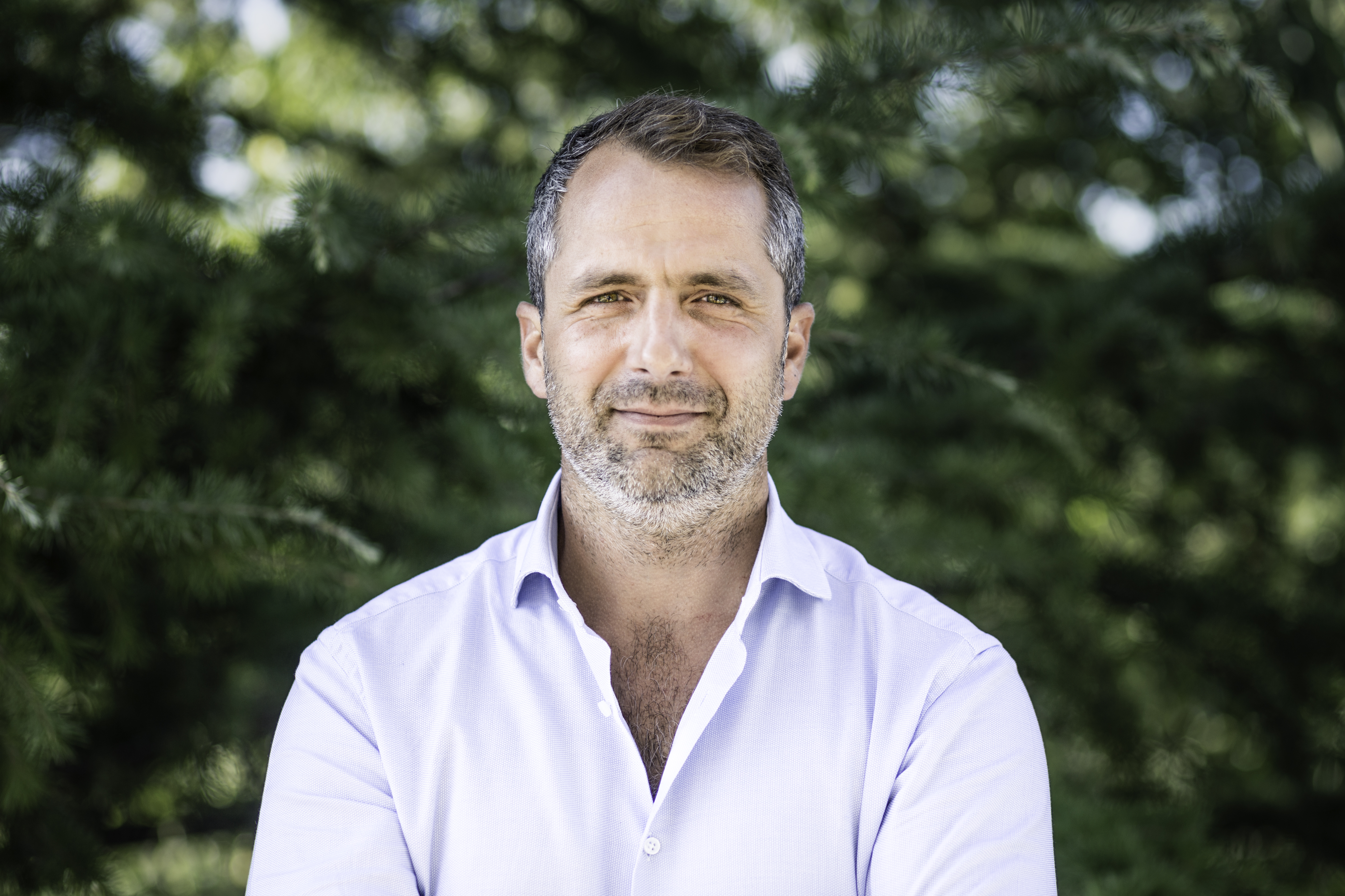 Cyril Vidal en 2017.